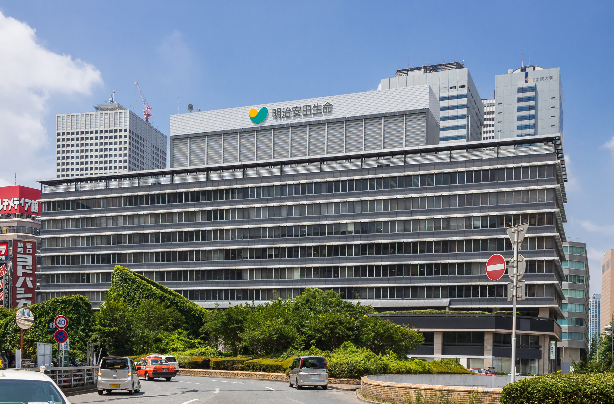 明治安田生命新宿ビル（旧安田生命本社ビル）